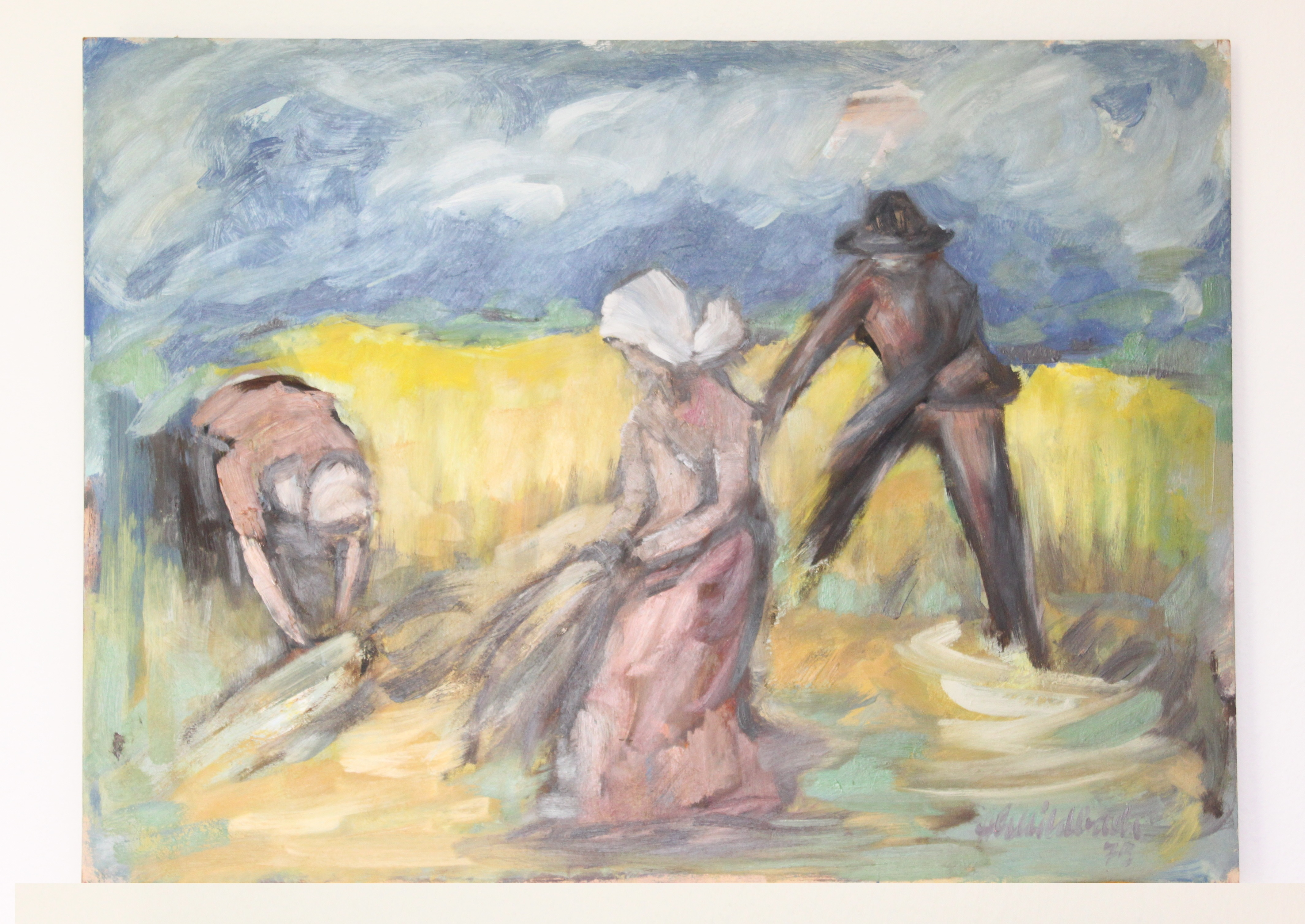 Die Datei zeigt ein mit Acrylfarben gemaltes Gemälde, das drei Menschen bei Erntearbeiten auf einem Feld darstellt.